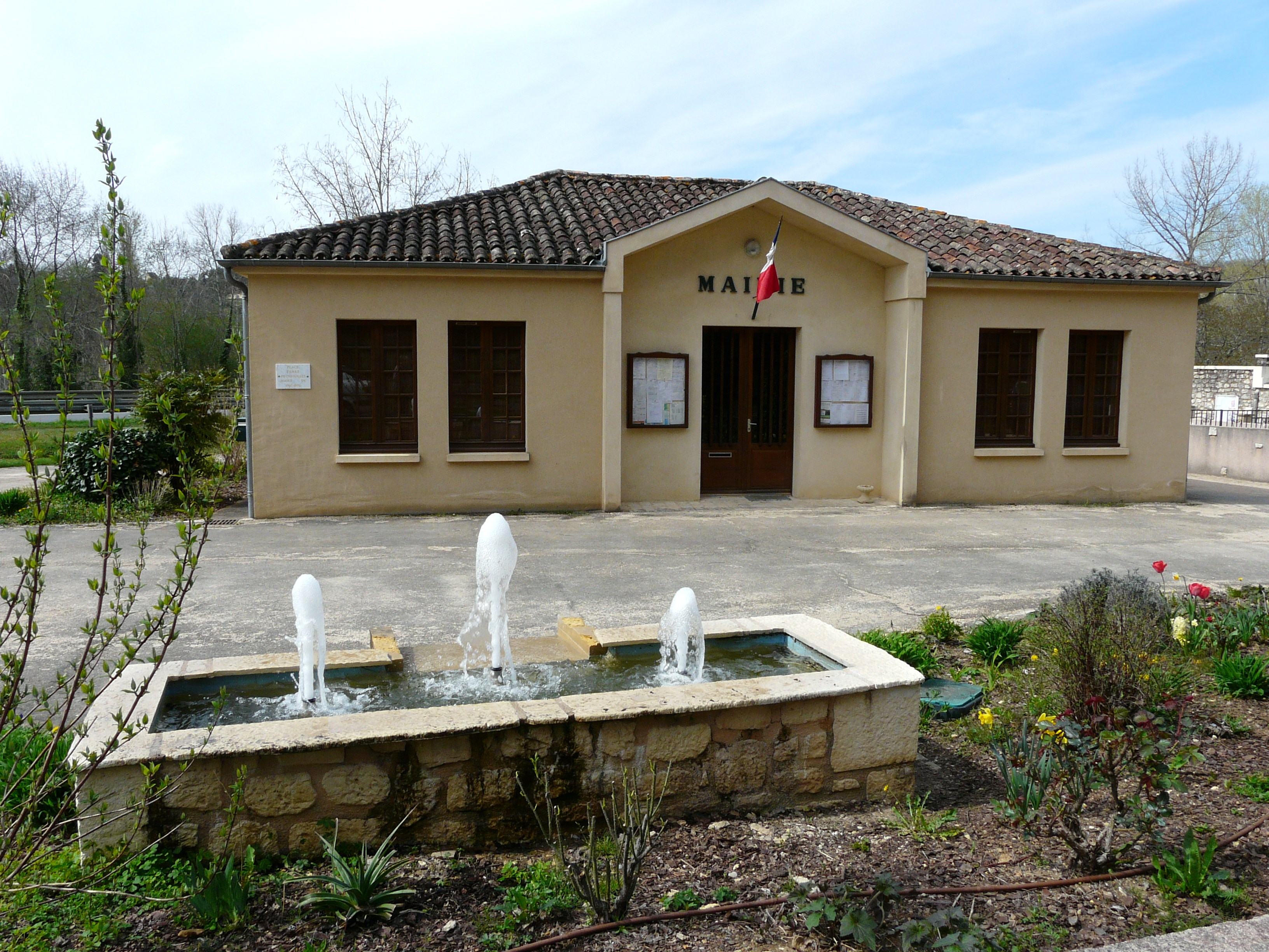 La mairie de Lamonzie-Montastruc, Dordogne, France.